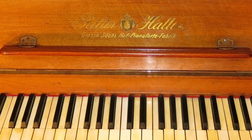 Ritter Klavier Signatur im Tastaturdeckel